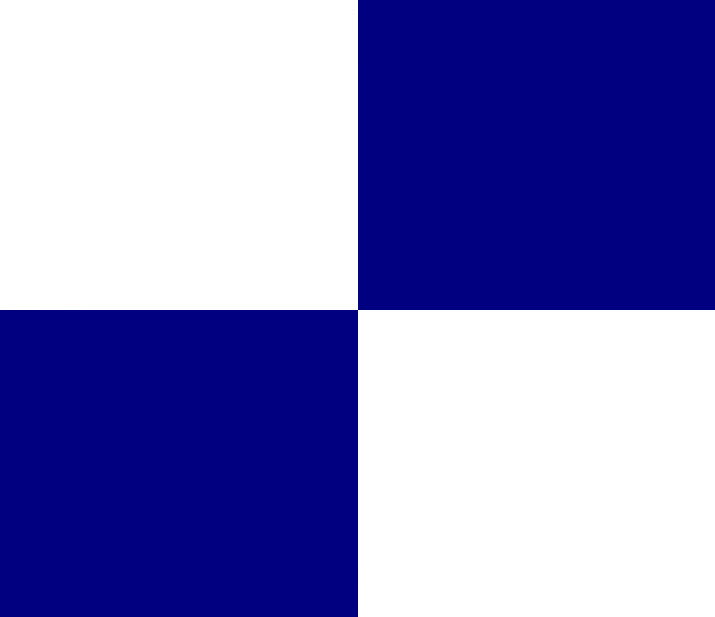 Fändel vu Saint-Ode